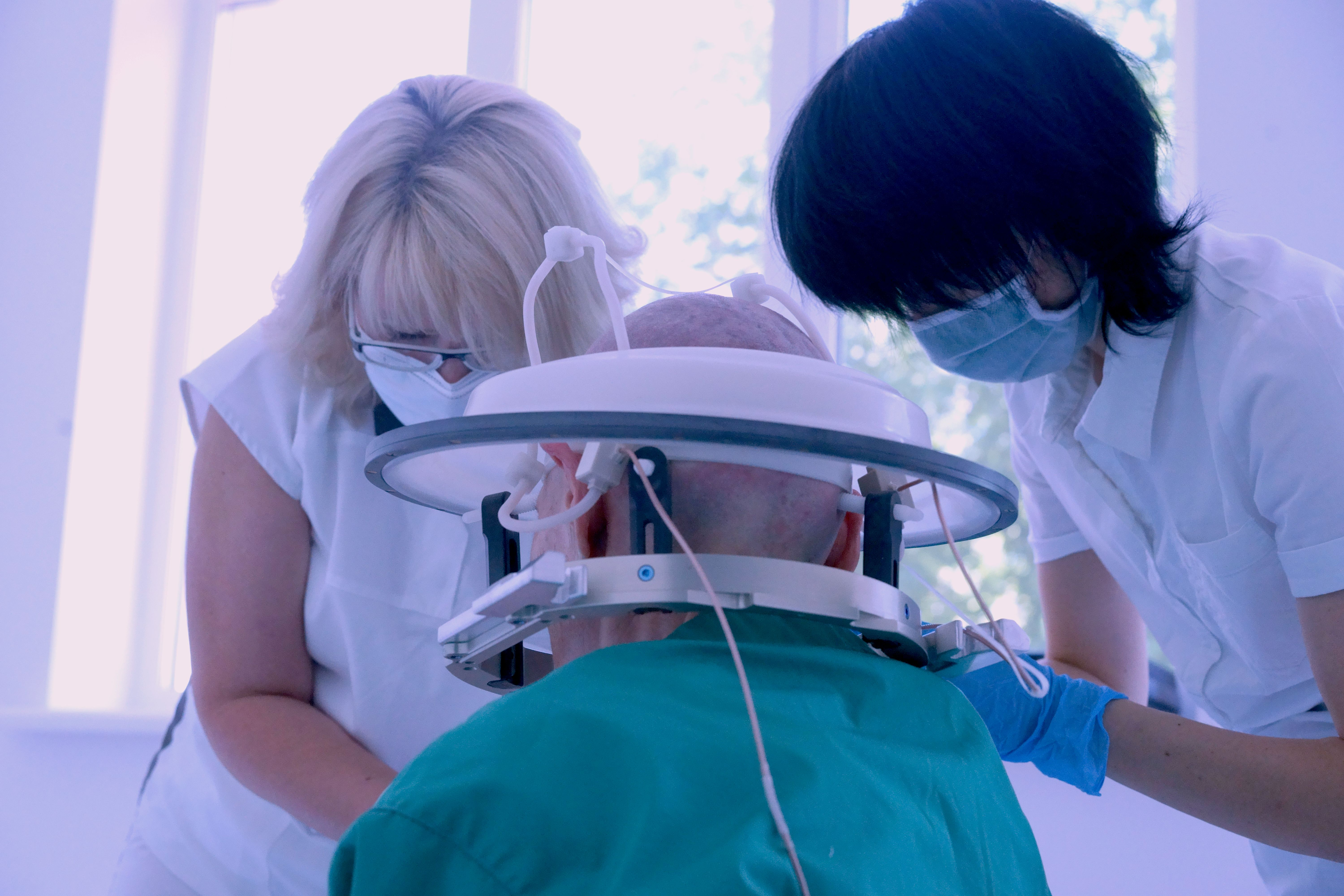 Шлем состоит из металлической стереотаксической рамки, силиконовой мембраны и катушек МРТ